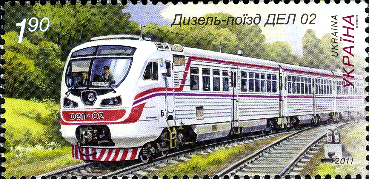 Марка України «Дизель-поїзд ДЕЛ 02». Серія «Локомотивобудування в Україні»